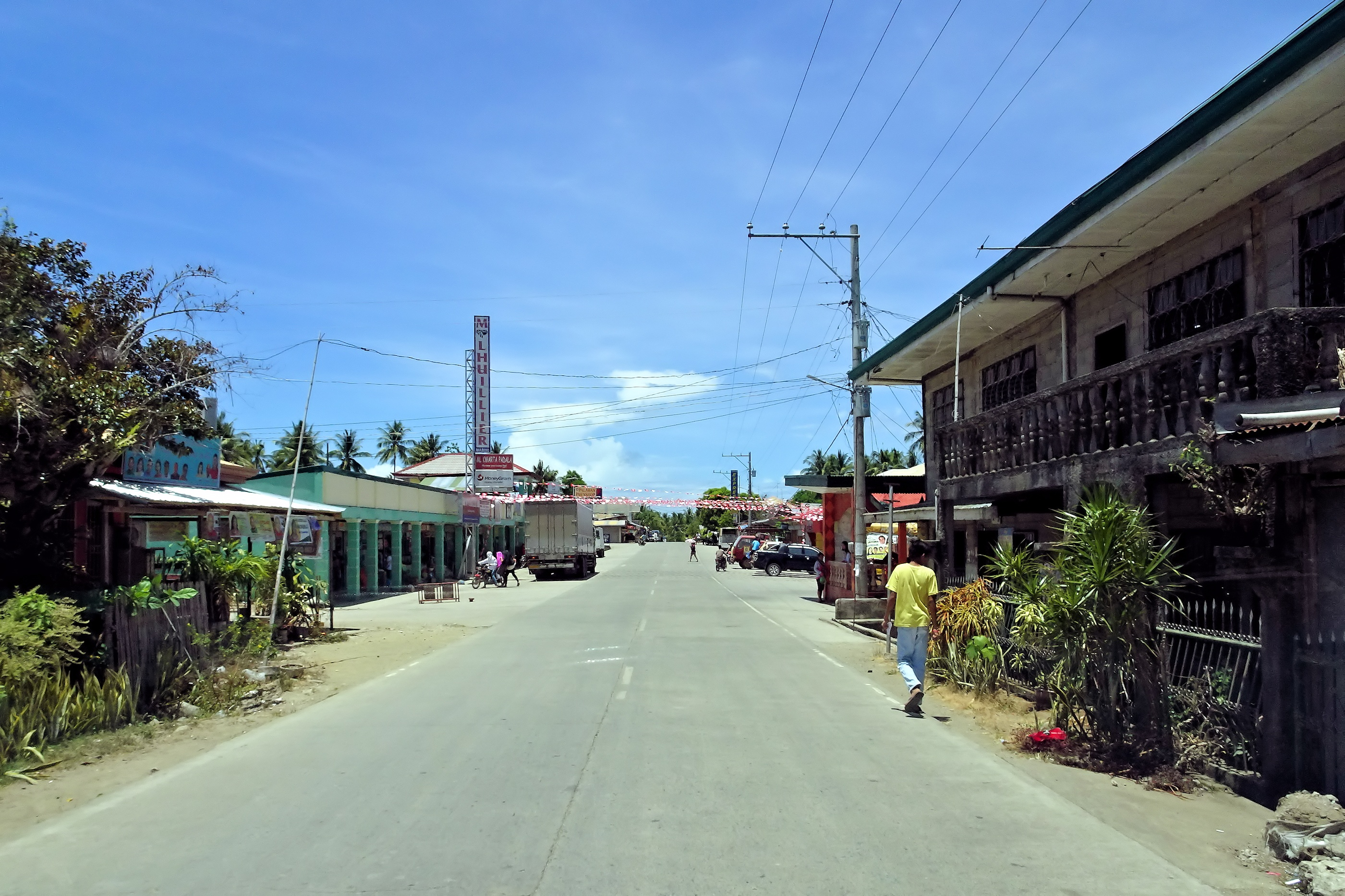 Mabini, Bohol, Philippines